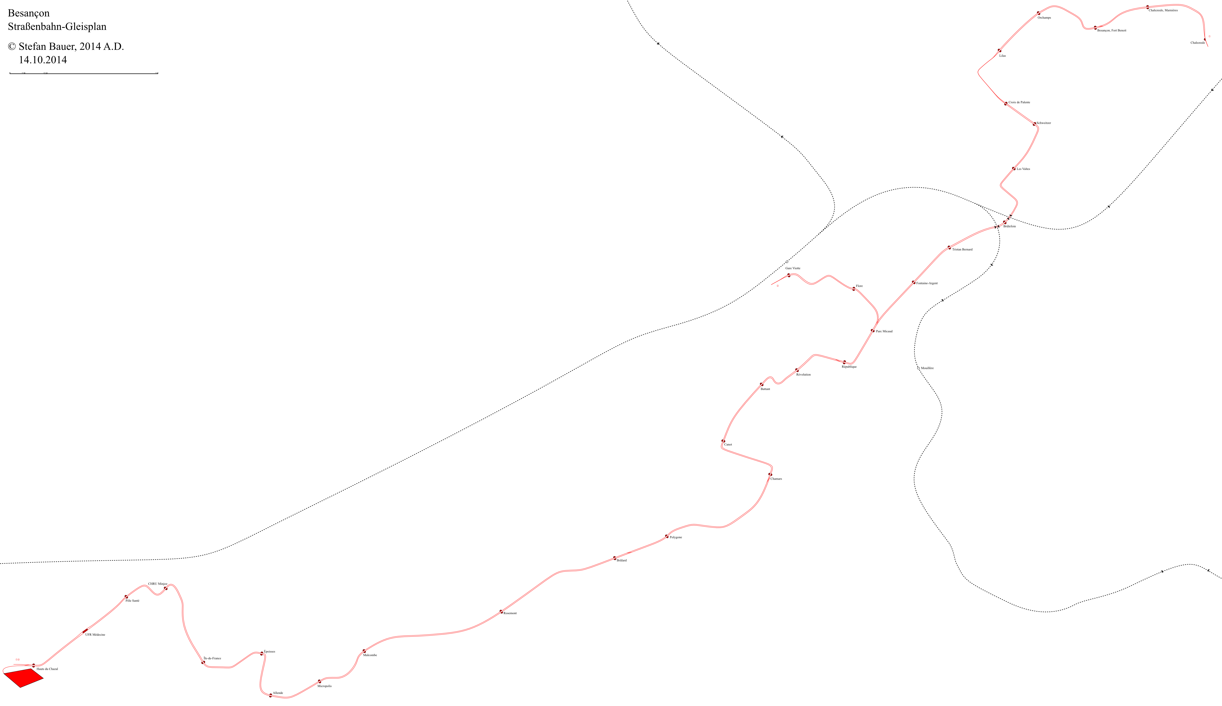 Plan des voies du réseau des tramways de Besançon 2014